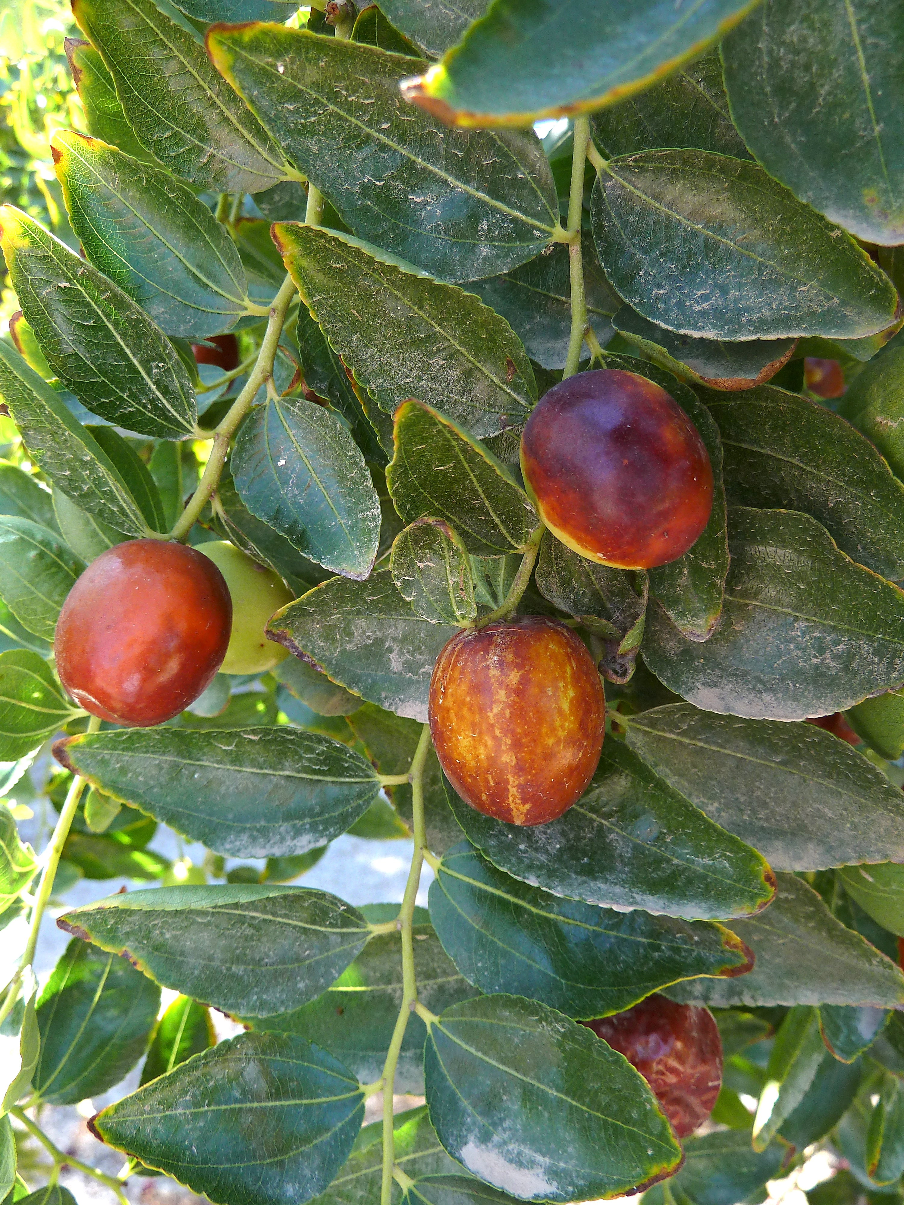 Ziziphus jujuba (Jinjolero, azufaifo) - Frutos submaduros in situ. - Cultivado, Camino de la Azarbe de Patricio, Albatera (Provincia de Alicante, España).